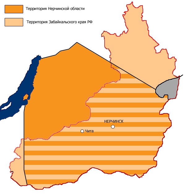 Карта территории Нерчинской области Российской империи (выполнена по карте XVIII века)